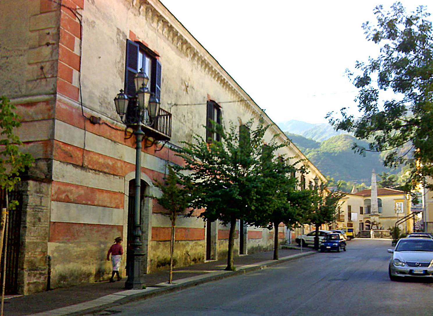 Corso Vittorio Emanuele a San Martino Valle Caudina (AV)